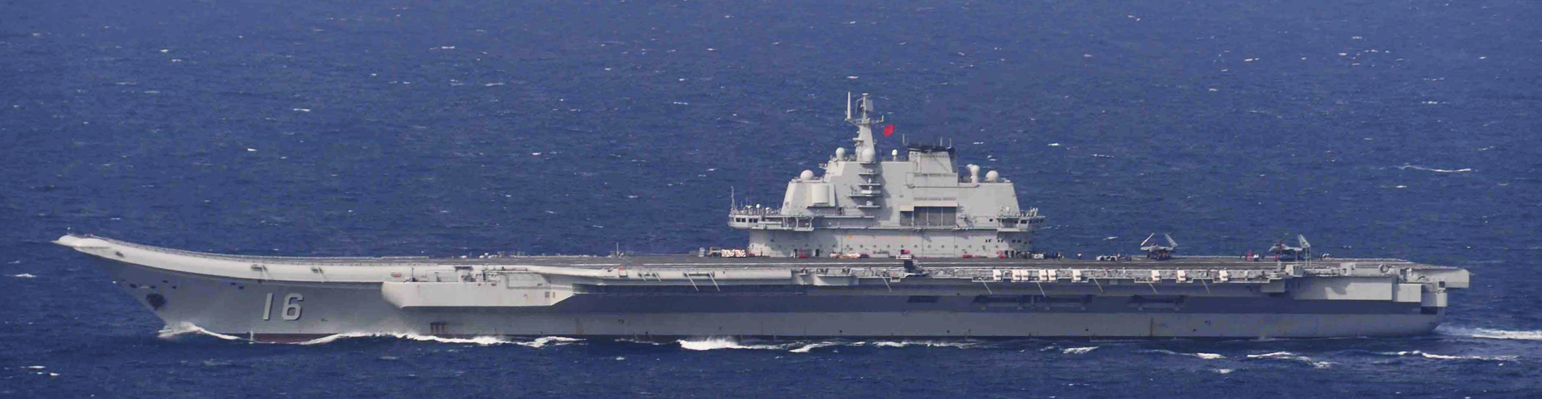 ４月２８日（火）午前９時頃、海上自衛隊第５護衛隊所属「こんごう」（佐世保）、第１２護衛隊所属「うみぎり」（呉）及び第５航空群所属「Ｐ－３Ｃ」（那覇）が、宮古島の南東約８０ｋｍの海域を北西進する中国海軍クズネツォフ級空母「遼寧」１隻、ルーヤンⅢ級ミサイル駆逐艦２隻、ジャンカイⅡ級フリゲート ２隻及びフユ級高速戦闘支援艦１隻の計６隻を確認した。 その後、これらの艦艇が沖縄本島と宮古島の間の海域を北上し、東シナ海へ向けて航行したことを確認した。 なお、これらの艦艇は、４月１０日（金）に男女群島（長崎県）南西で確認され、その後、沖縄本島と宮古島の間の海域を南下したものと同一である。